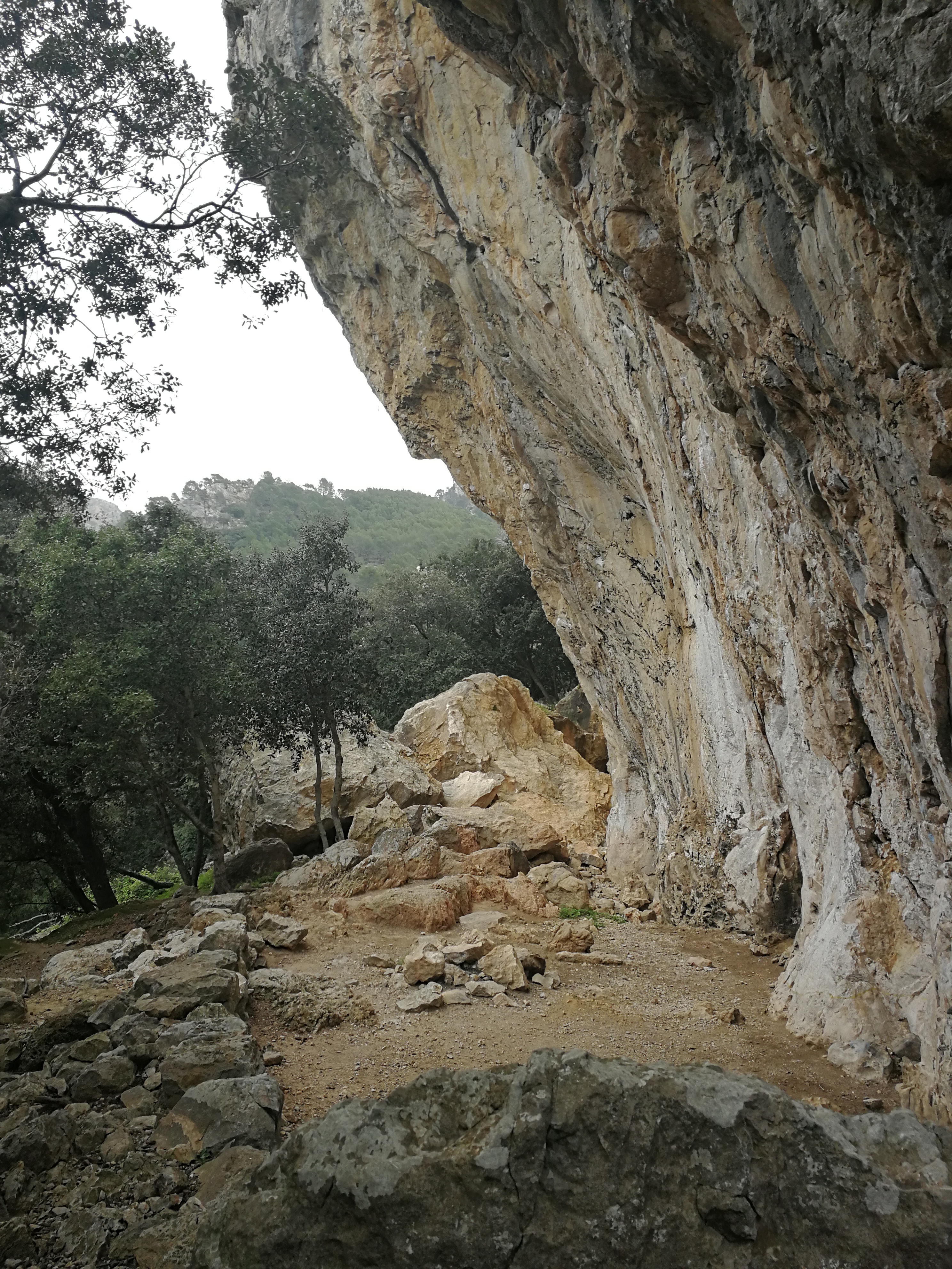 Resta prehistòrica de Son Matge (Valldemossa)